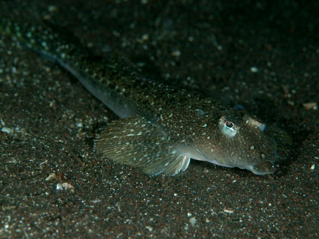 ヤリヌメリ Repomucenus huguenini